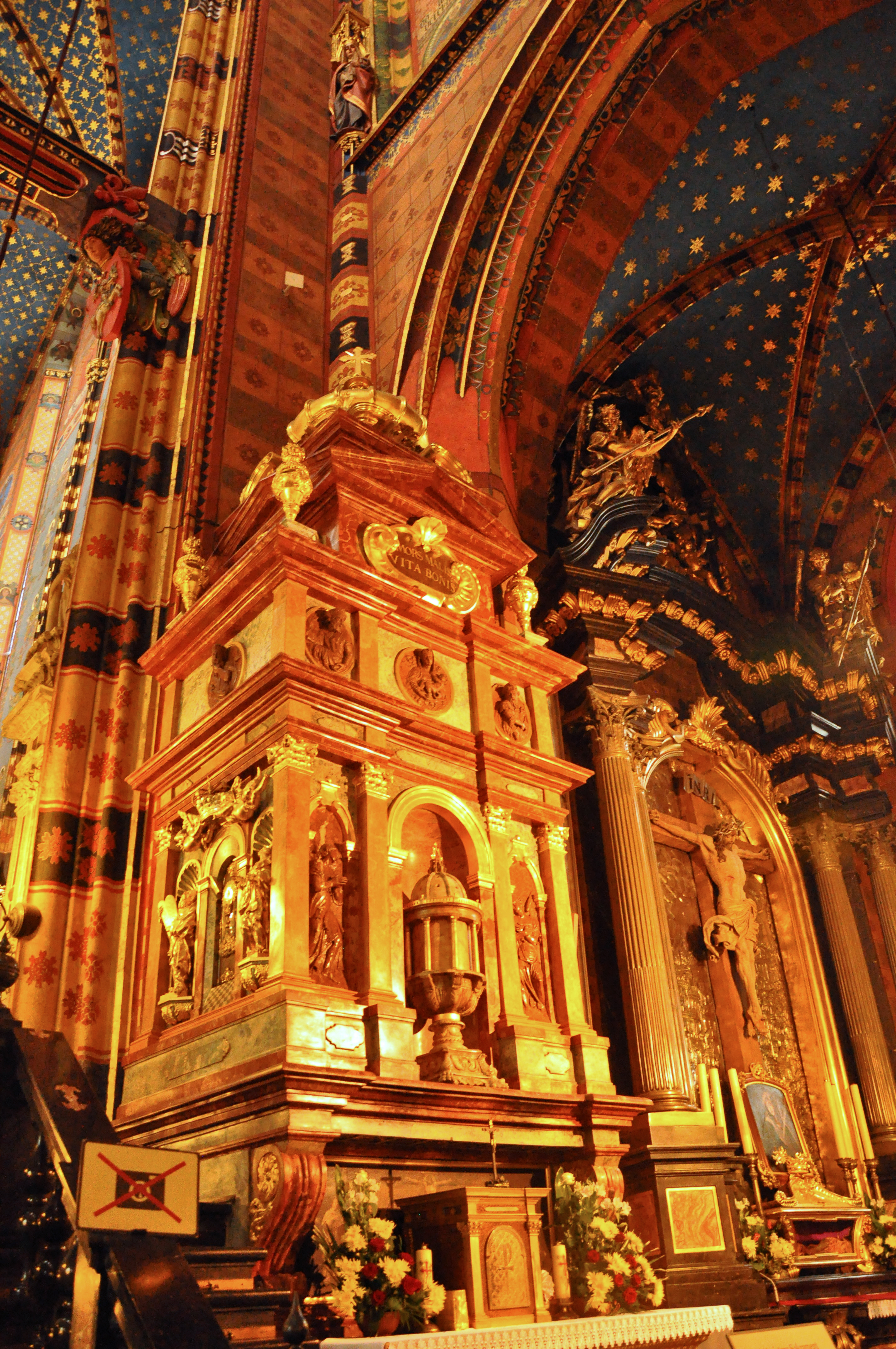 Kościół Mariacki w Krakowie - wnętrze. Na pierwszym planie cyborium z prawej - tzw. Krucyfiks Slackerowski Wita Stwosza